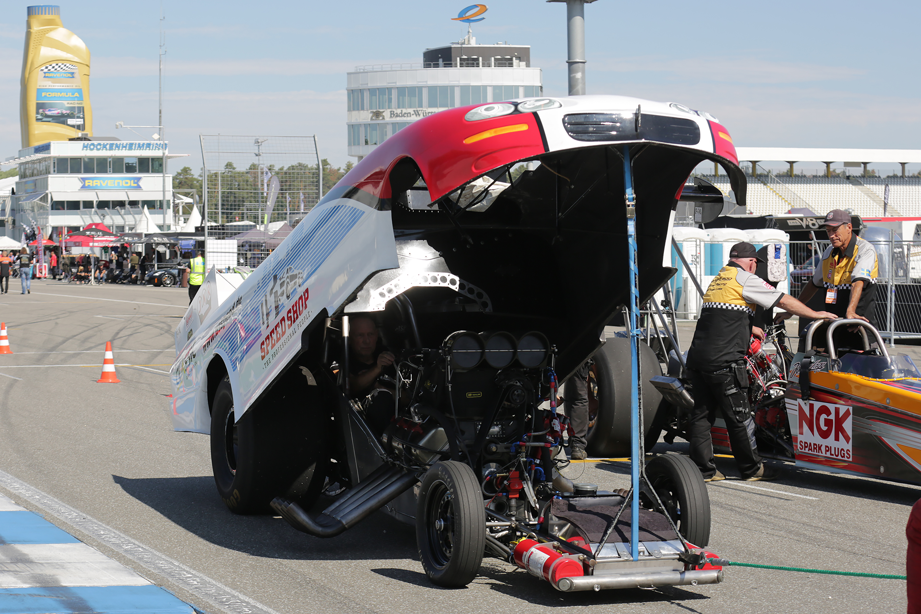 FIA Top Methanol Funny Car mit hochgeklappter "Karosserie/Body" (einteiliger Kunststoff Abguss). Driver: Jürgen Nagel (GER). Nitrolympx 2019